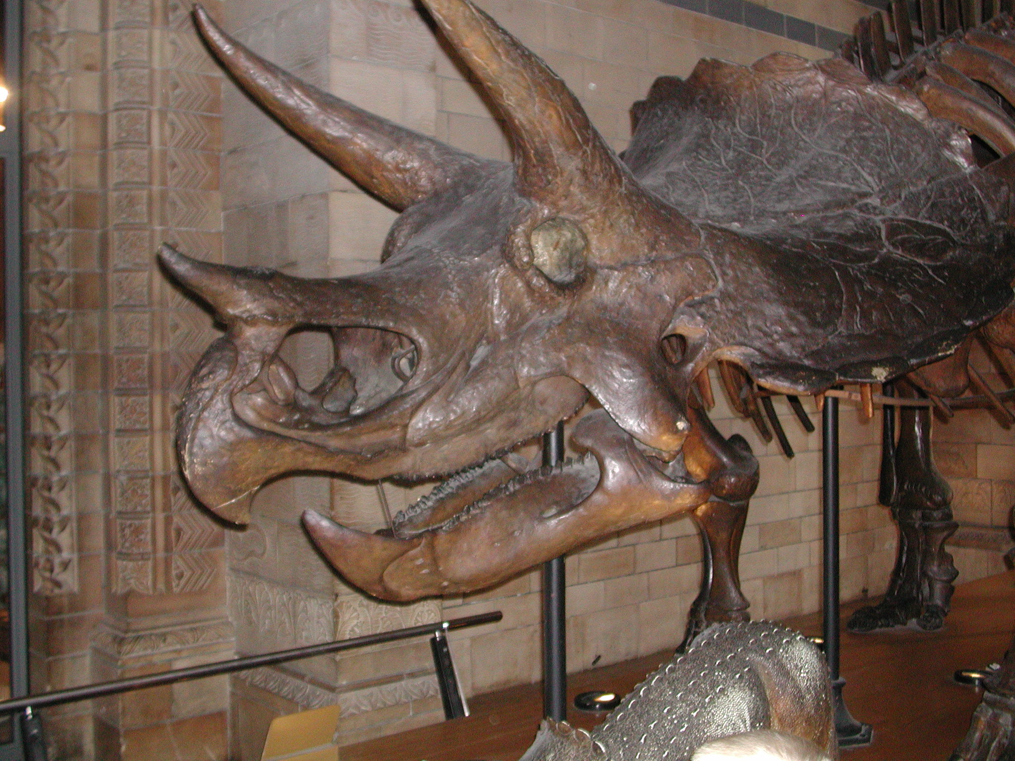 Triceratops